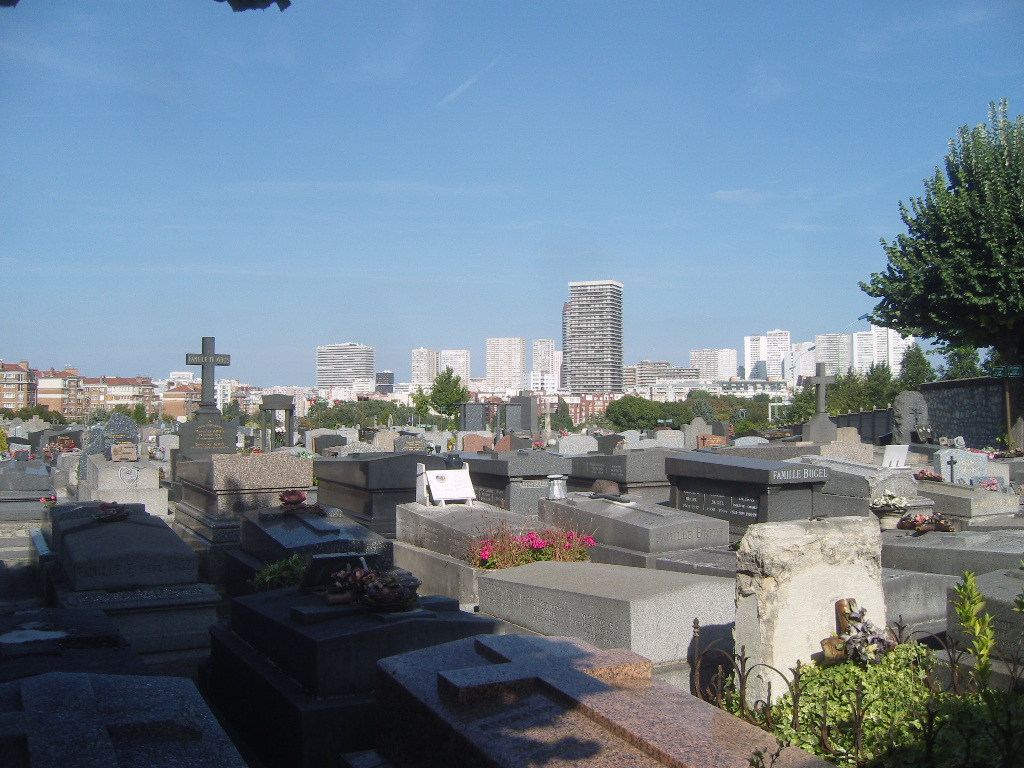 Gentilly, cimetière de Gentilly, au fond les tours du 13e arrondissement de Paris, au centre la tour Chambord